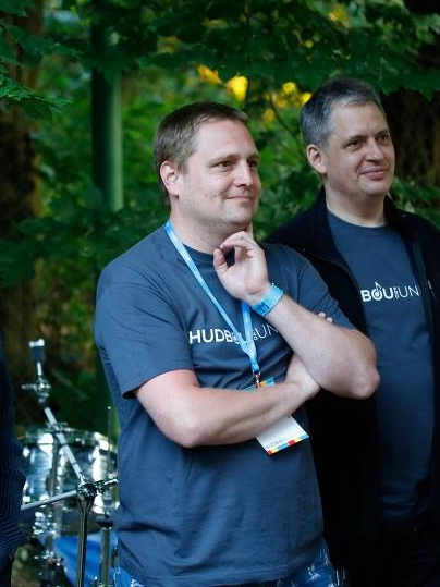 Jan Schneider jako ředitel festivalu Hudbou pro UNICEF, napravo Jiří Dienstbier, Tišnov